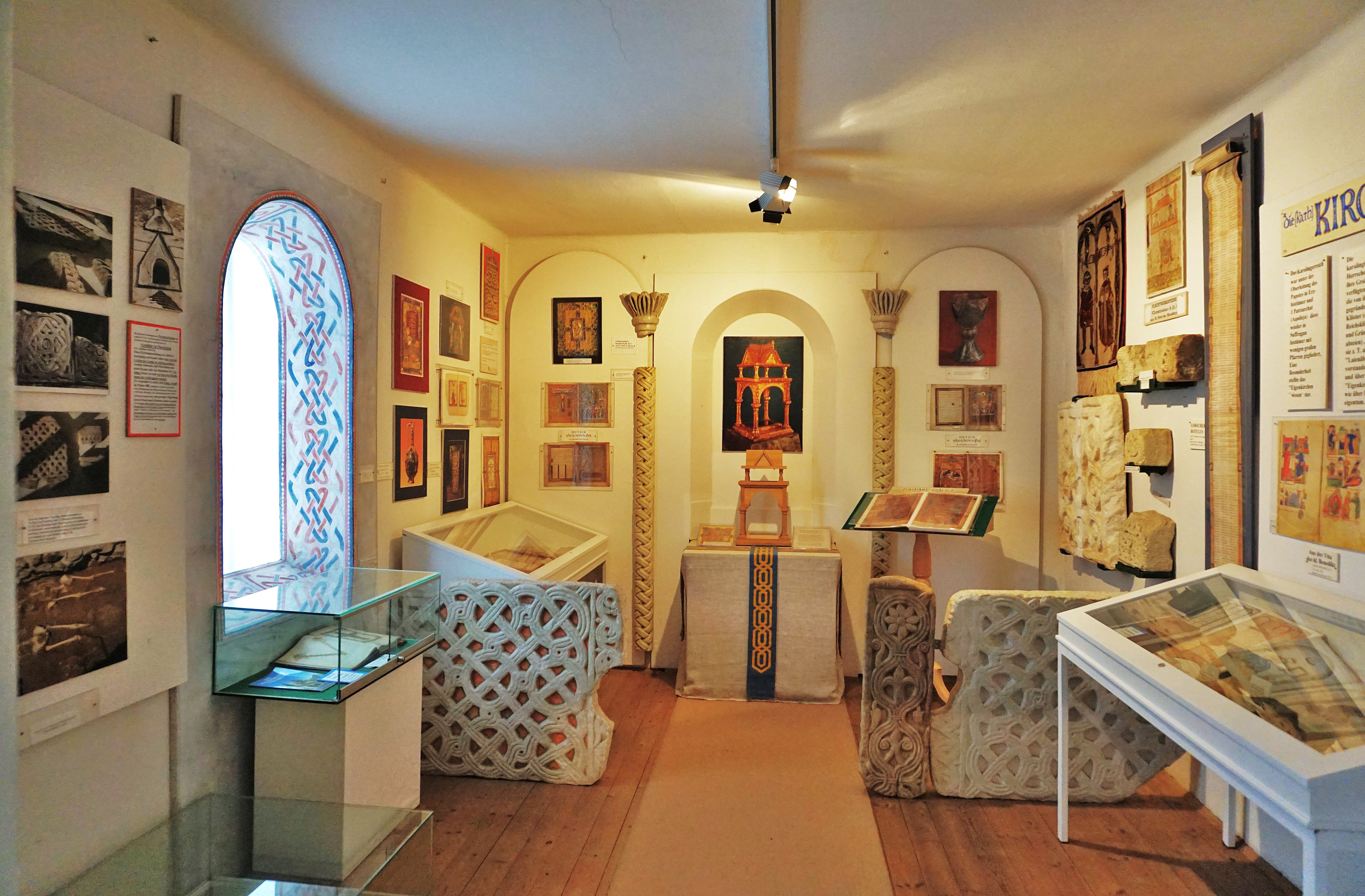 Karolinger Museum in Moosburg (Kärnten), Innenansicht